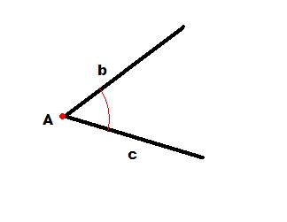 Vértiz nún ángulu